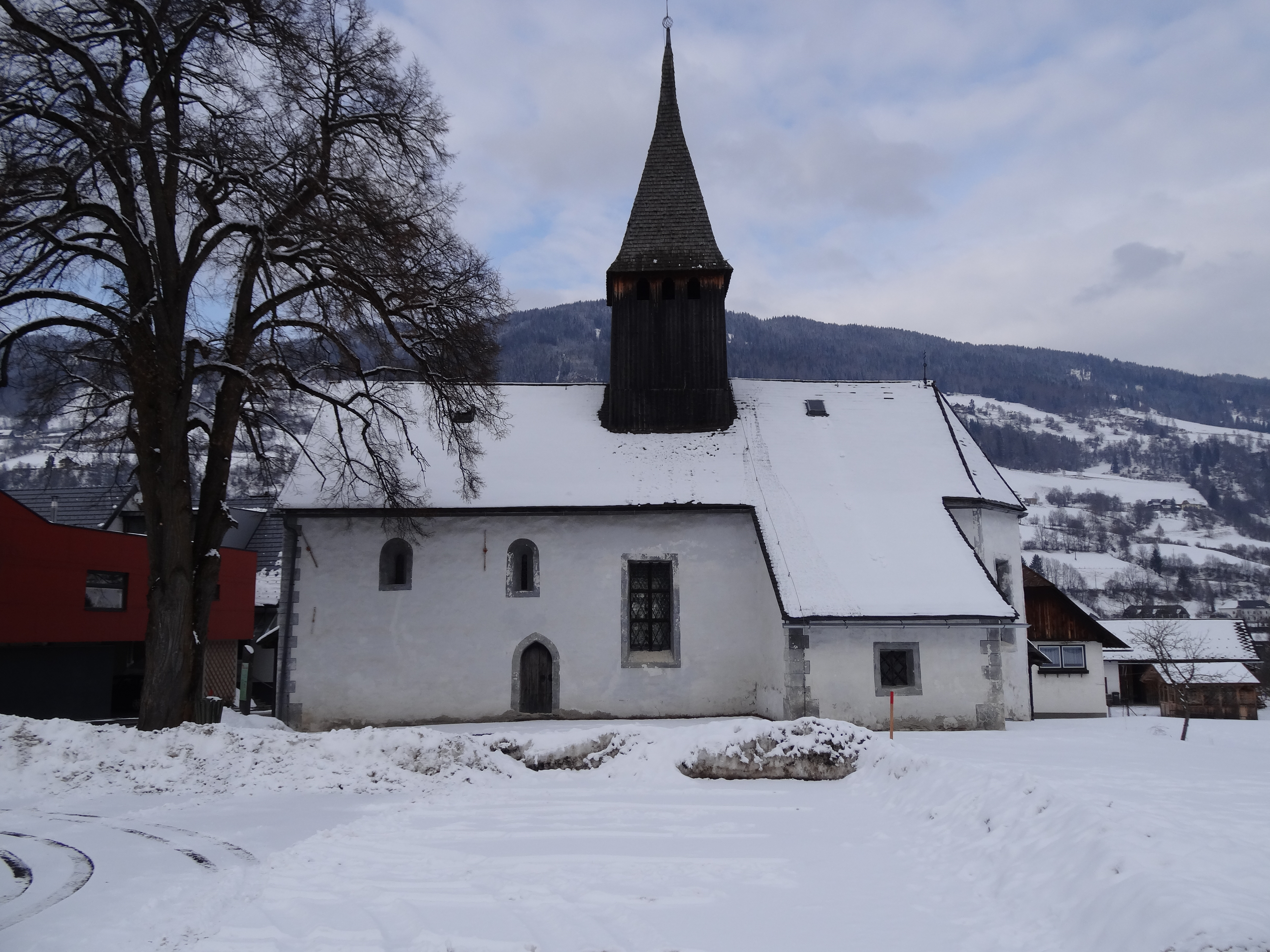 Filialkirche Sankt Lorenzen ob Murau